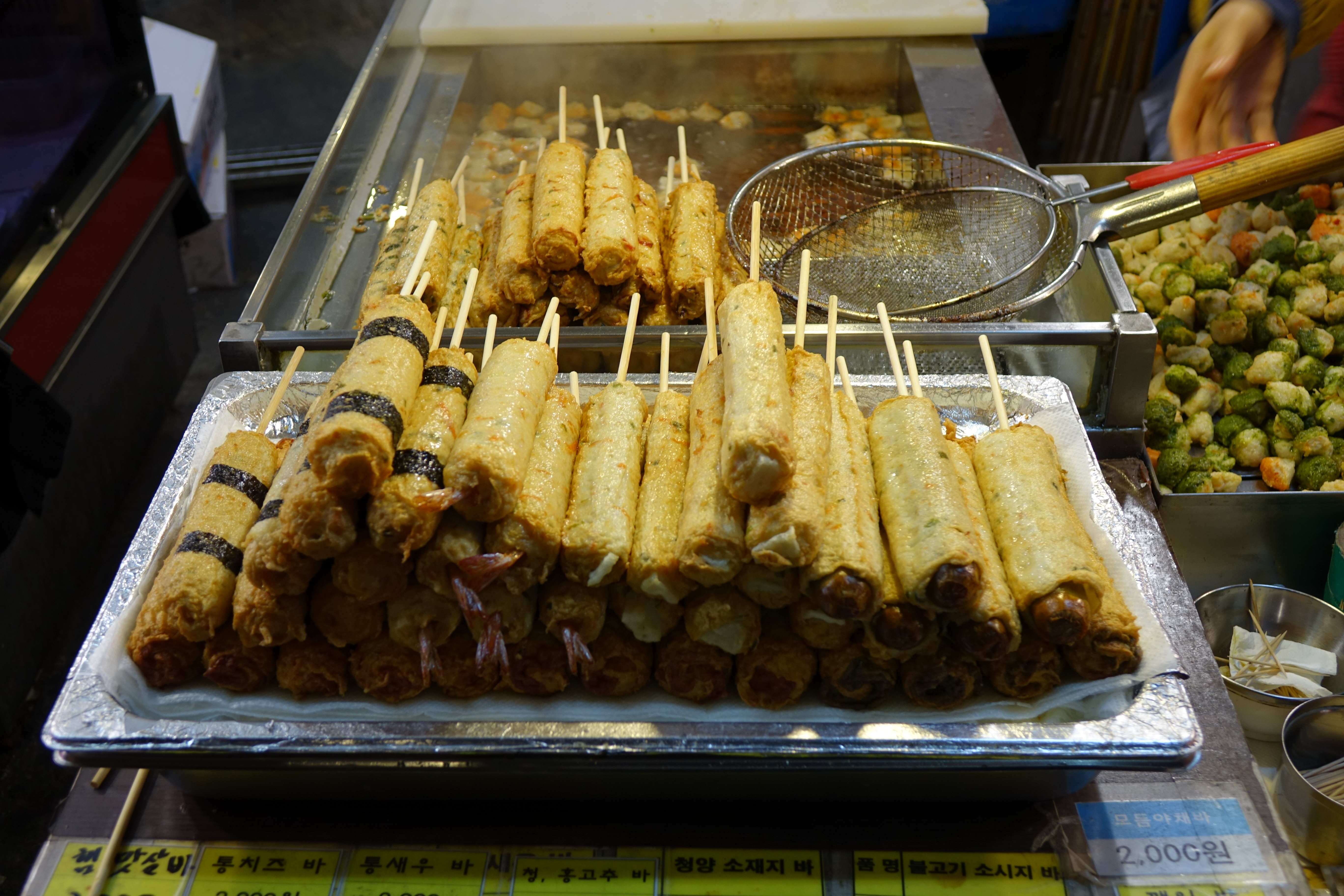 2015년 1월 27일 최광모 촬영